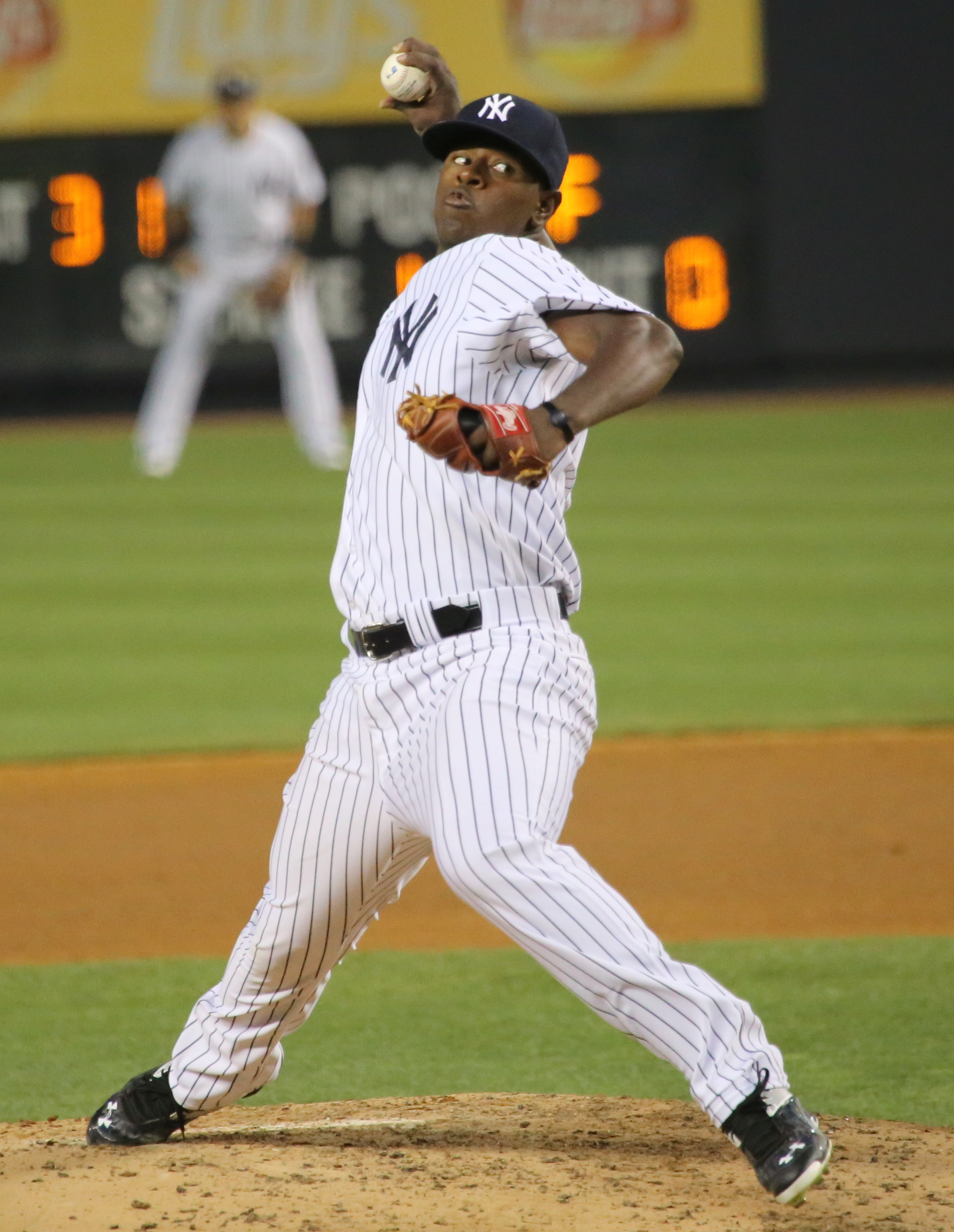 Luis Severino